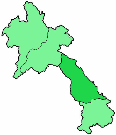 Mappa del Vicariato Apostolico cattolico di Savannakhet, in Laos. Lavoro personale, eseguito a partire da questa immagine di Commons. Fonte per i confini delle diocesi: Guida delle missioni cattoliche 2005, a cura della Congregatio pro gentium evangelizatione, Roma, Urbaniana University Press, 2005.